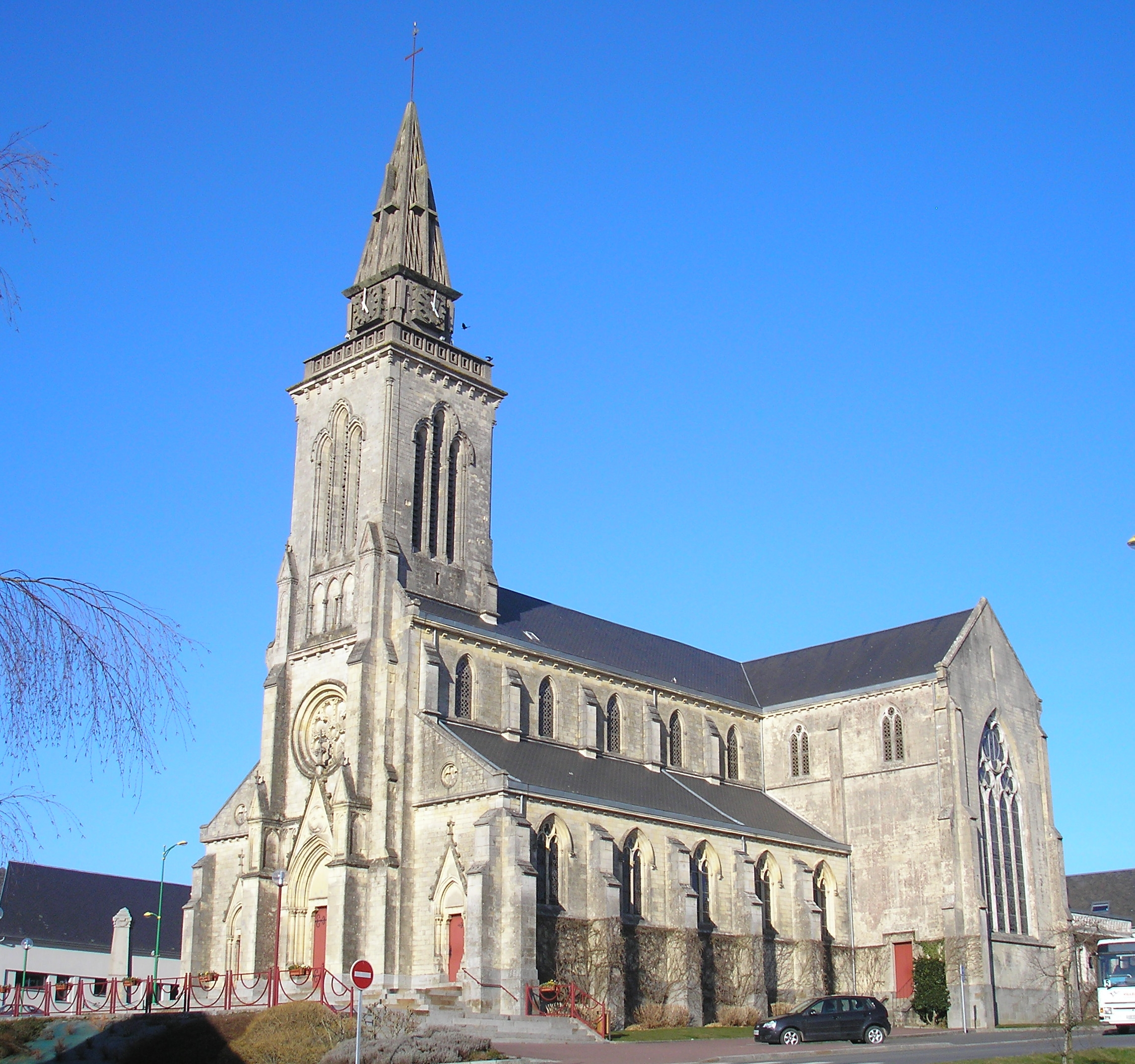 Percy (Normandie, France). L'église Saint-Jean-Baptiste.